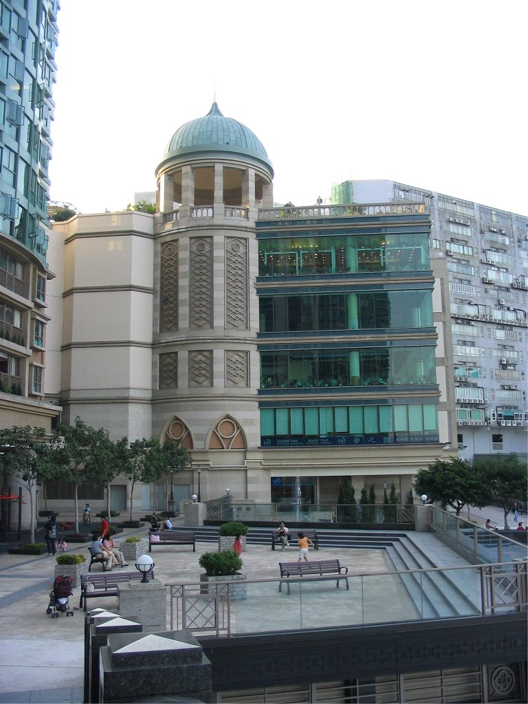 海逸豪園-漁人碼頭商場 Fisherman's Wharf, Laguna Verde